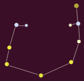 한국의 별자리 중 '미(尾)'